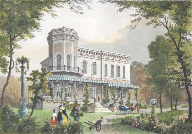 Villa Hoboken te Rotterdam, waarin thans het Natuurmuseum is gevestigd. Illustratie op blz. 256 van "Het Koningrijk der Nederlanden, voorgesteld in eene reeks van naar de natuur geteekende schilderachtige gezigten en beschreven door J.L. Terwen". Uitgegeven: Gouda, Gerrit Benjamin van Goor [1858-62] in drie delen (820 p.). Staalgravure door J. Umbach naar een tekening van L. Rohbock.